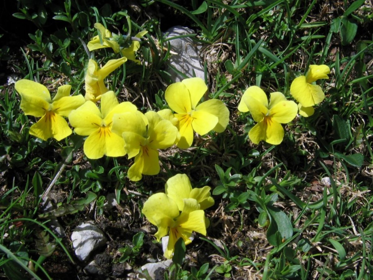 Zoisova vijolica na Struški (Karavanke).